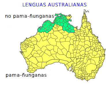 Basado en image:Australian_languages.png.